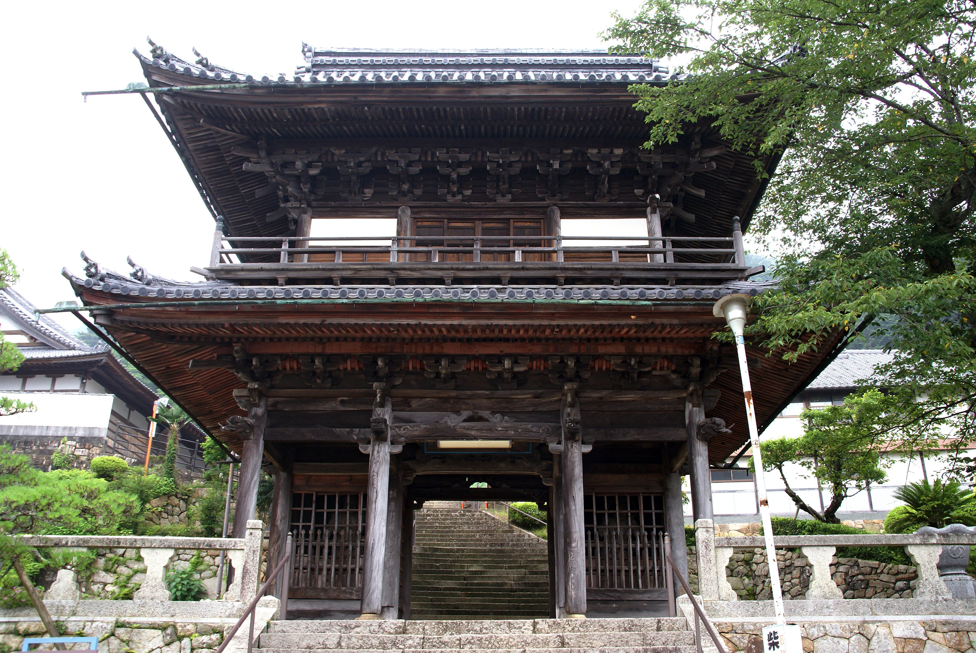 Keirinji in Maizuru, Kyoto prefecture, Japan